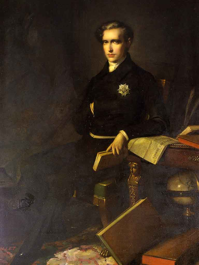 Napoleon II., Herzog von Reichstadt